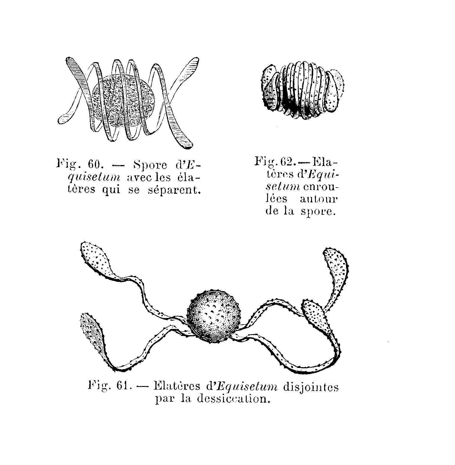 Equisetum - spore & élatères